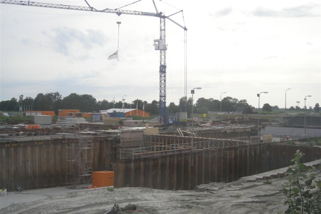 Geau-akwadukt (Geeuw aquaduct), canal aqueduct in Sneek